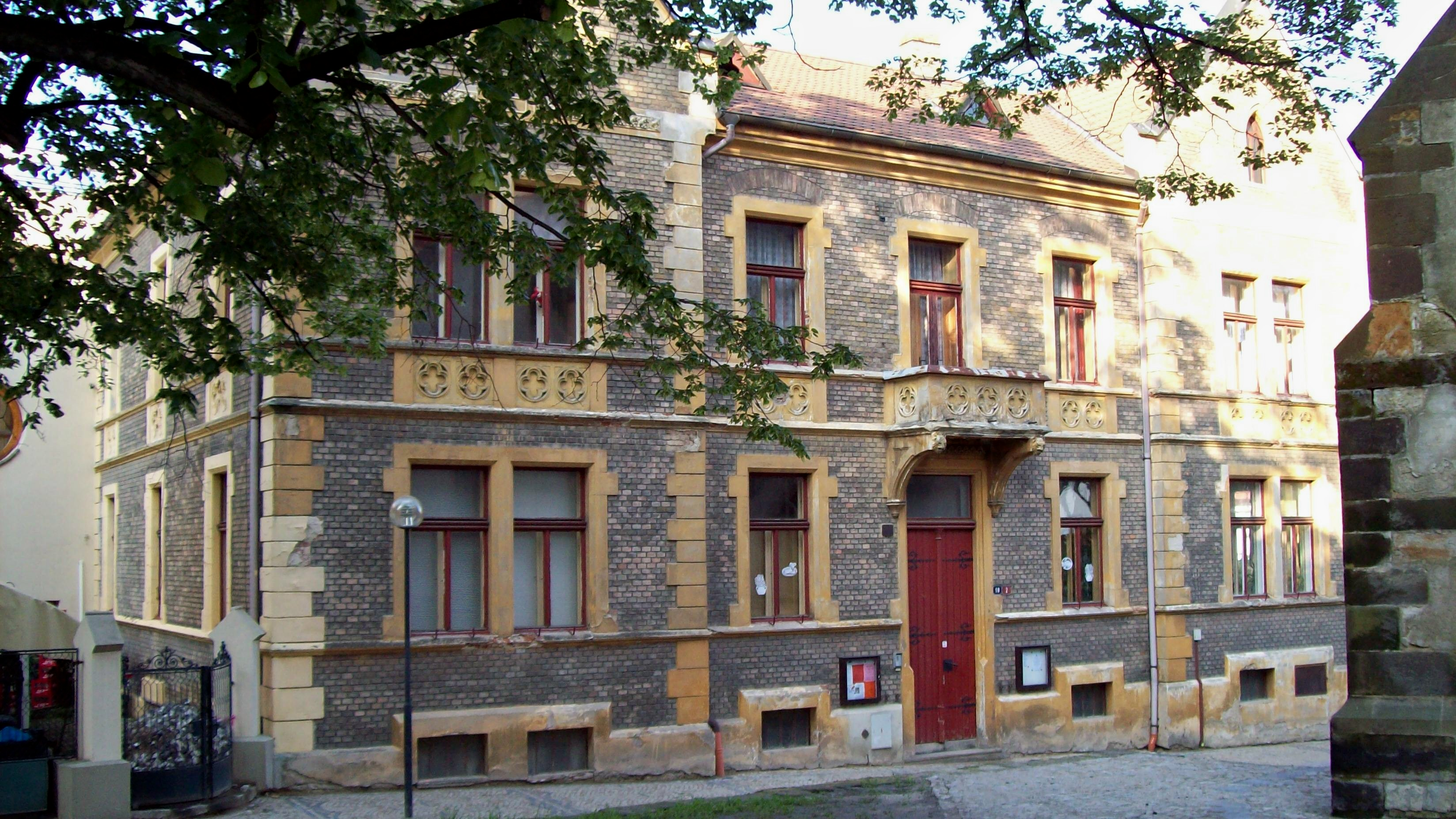 Římskokatolická farnost Proboštství Mělník, ul. Na vyhlídce 18.